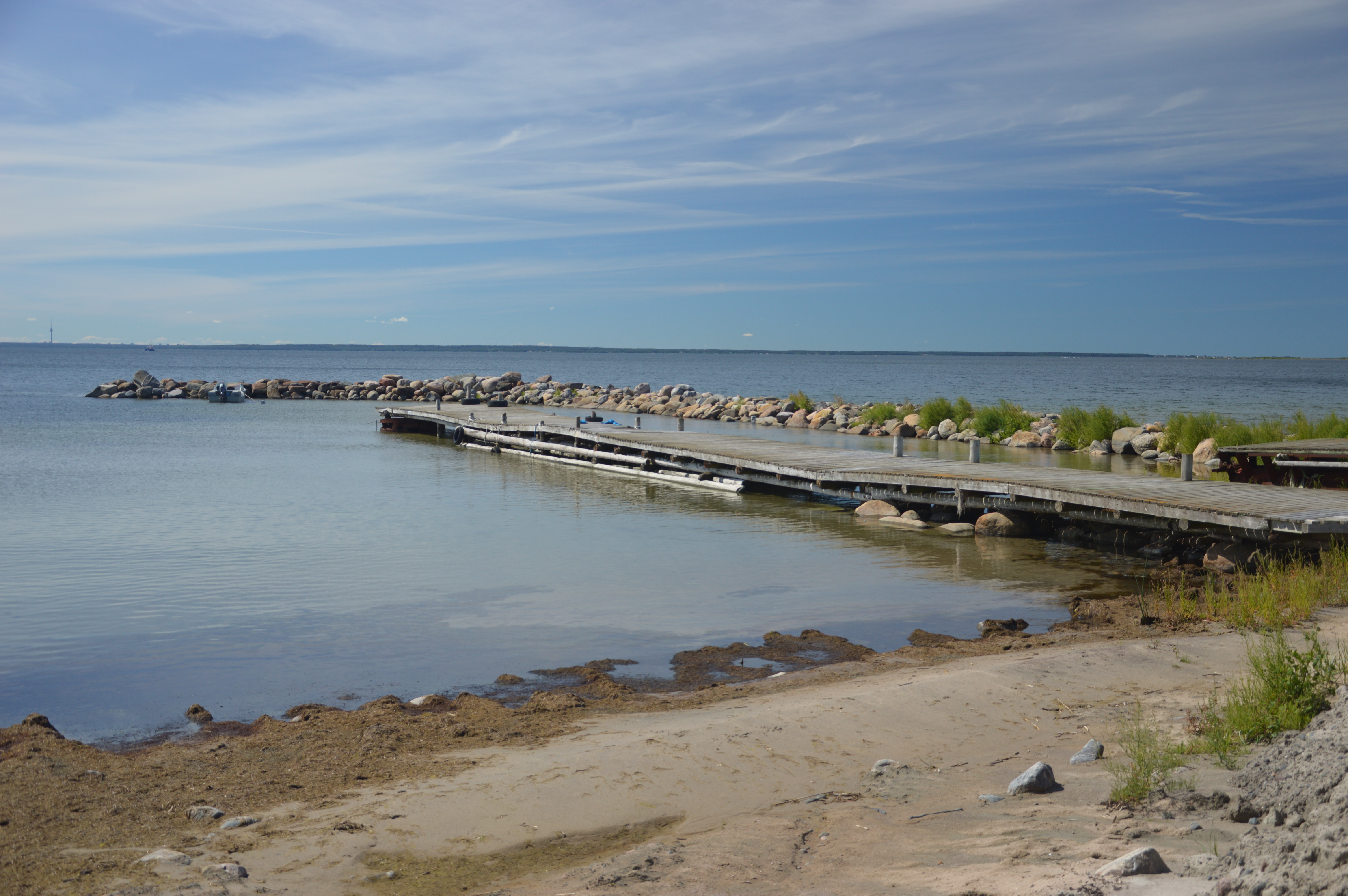 Mölgi sadam ehk Prangli Lõunasadam.